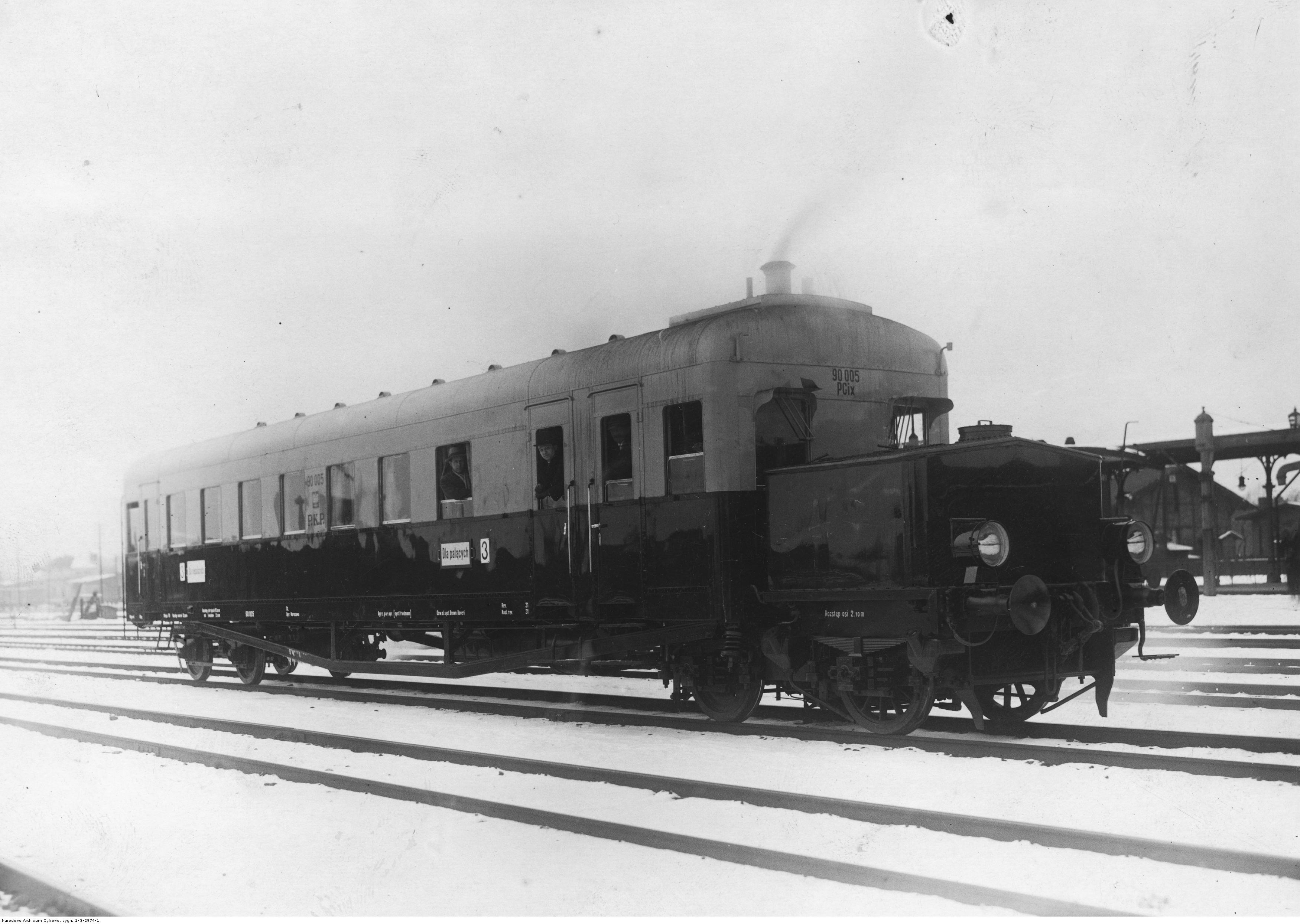 Motorowy wagon parowy serii PCix nr 90005 wykonany przez wytwórnię H. Cegielski w Poznaniu podczas jazdy próbnej.